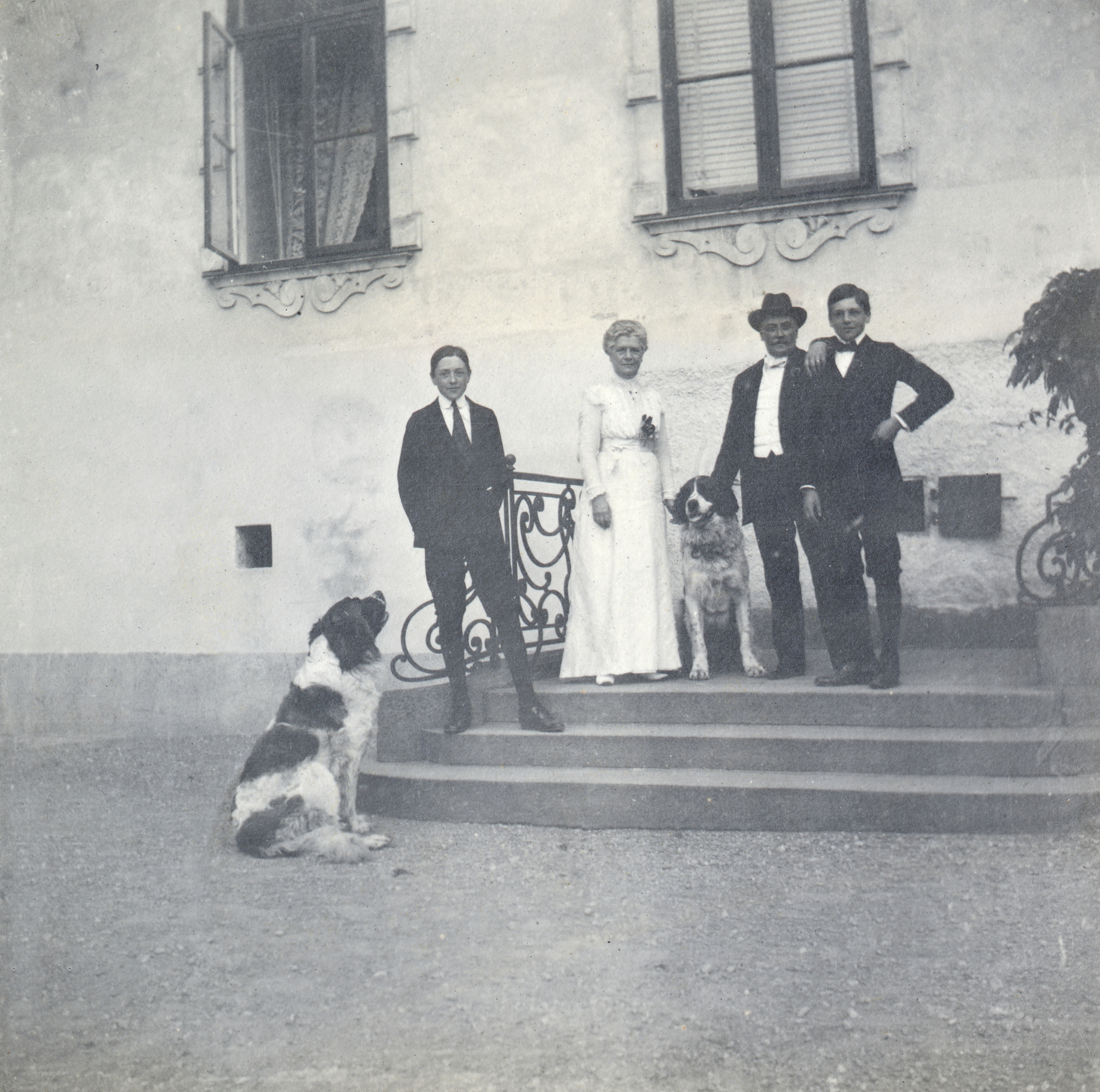 Caroline och Claes Lagergren med de två sönerna Carl (född 1899) och Johan (född 1898) samt familjens S:t Bernhardshundar på Tyresö slotts trappa. Äldste sonen Claes (född 1892) saknas i bilden.